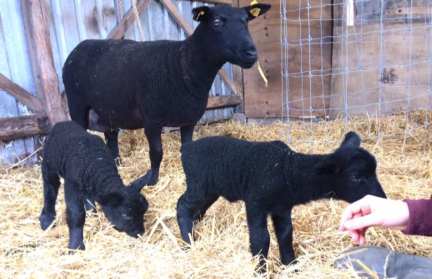 Moderfår med to yngre lam